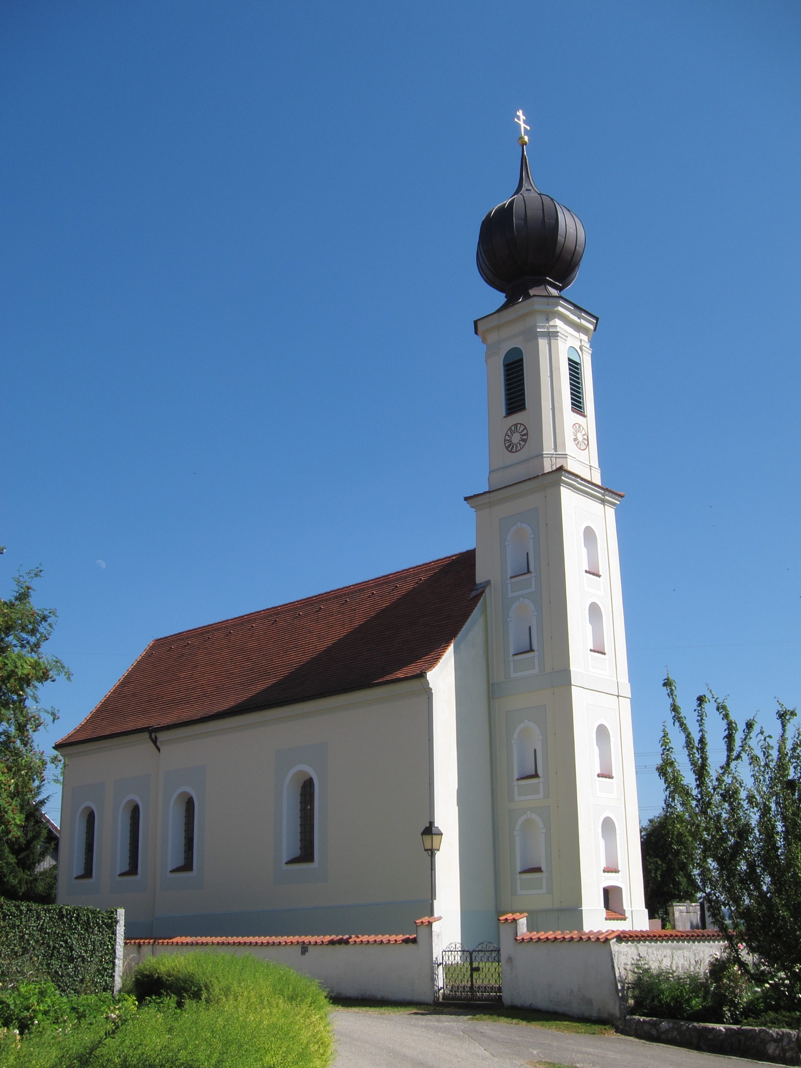 Jaibing 4; katholische Filialkirche St. Johannes d. T., Saalbau mit leicht eingezogenem Polygonalchor, angefügter Sakristei und Westturm mit Zwiebelhaube, spätgotisch, Turm und barocke Umgestaltung von Johann Baptist Lethner, 1761.